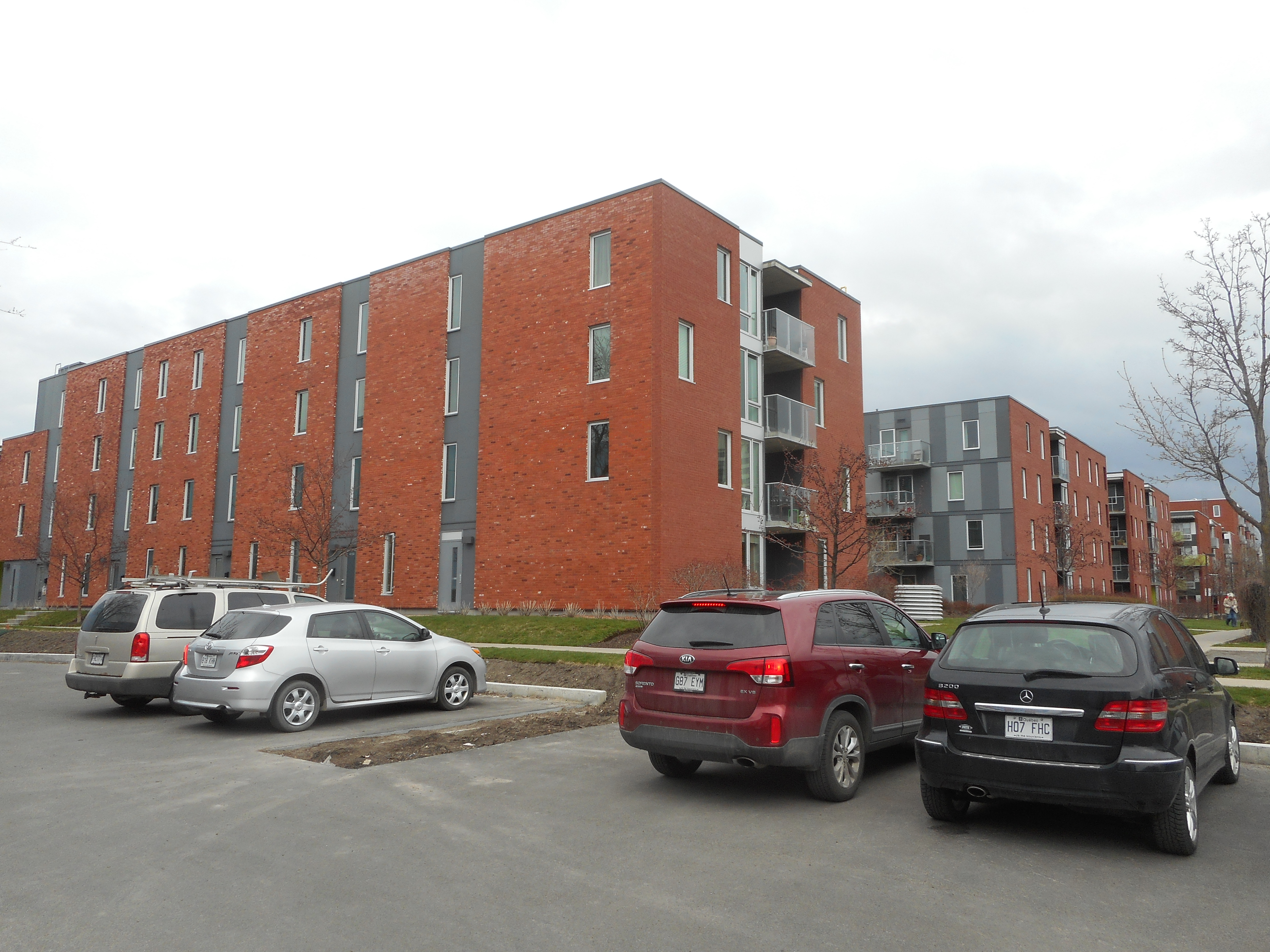 Immeubles Benny Farm, avenue Benny, Montréal